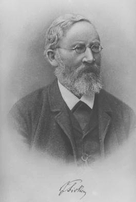 Julius von Ficker (1826–1902),deutsch-österreichischer Historiker. Radierung von August Steininger: Blatt: 39,8 x 30 cm Platte: 13,5 x 9,5 cm Julius von Ficker. Image taken from the aeiou Encyclopedia .The original Described under the facsimile signature in the plate: A. Steininger sc. Druck d. Gesellschaft d. verviel. Kunst. Wien.